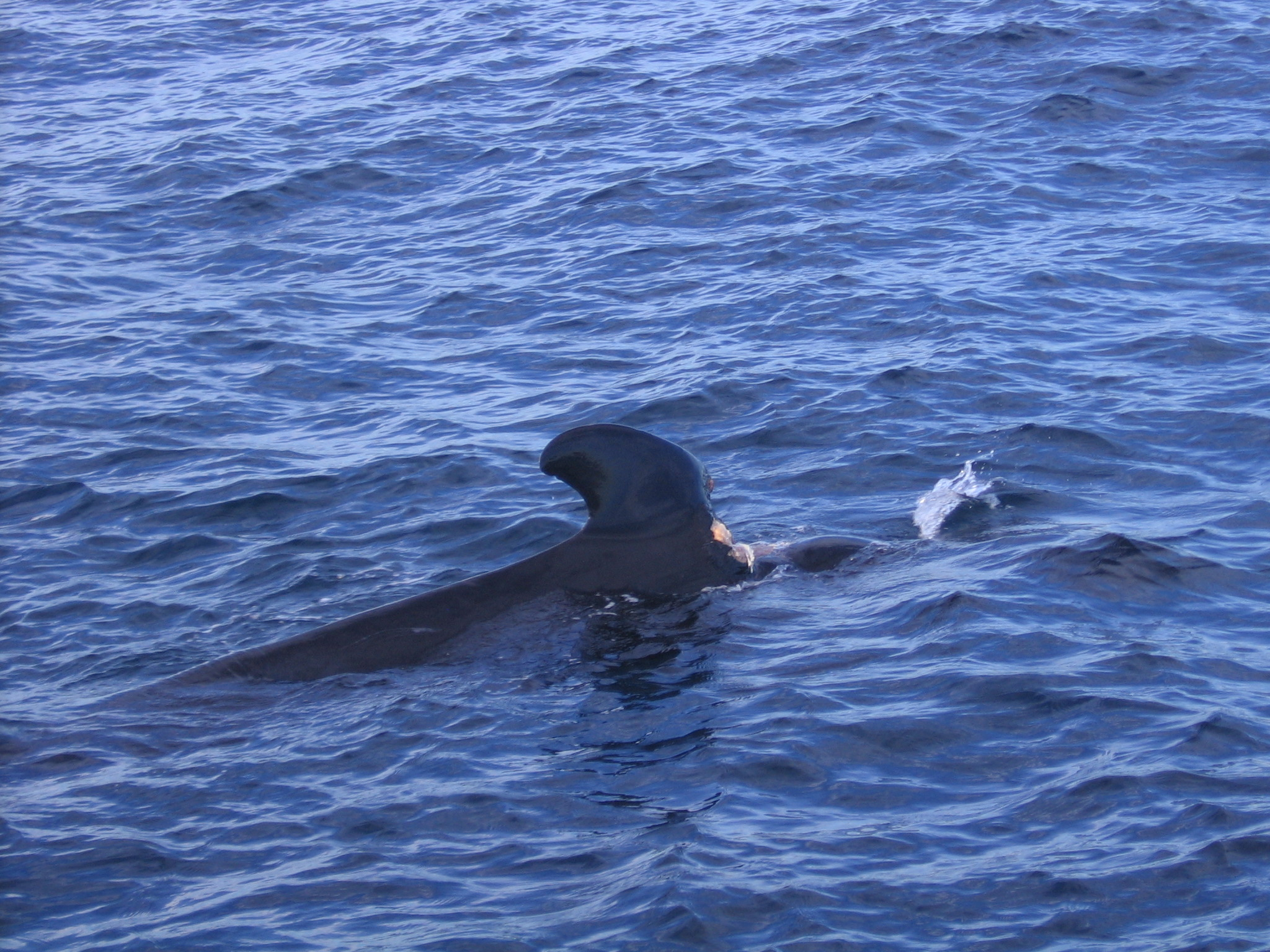 Calderón común (Globicephala melas) herido en la aleta dorsal por la hélice de un barco.